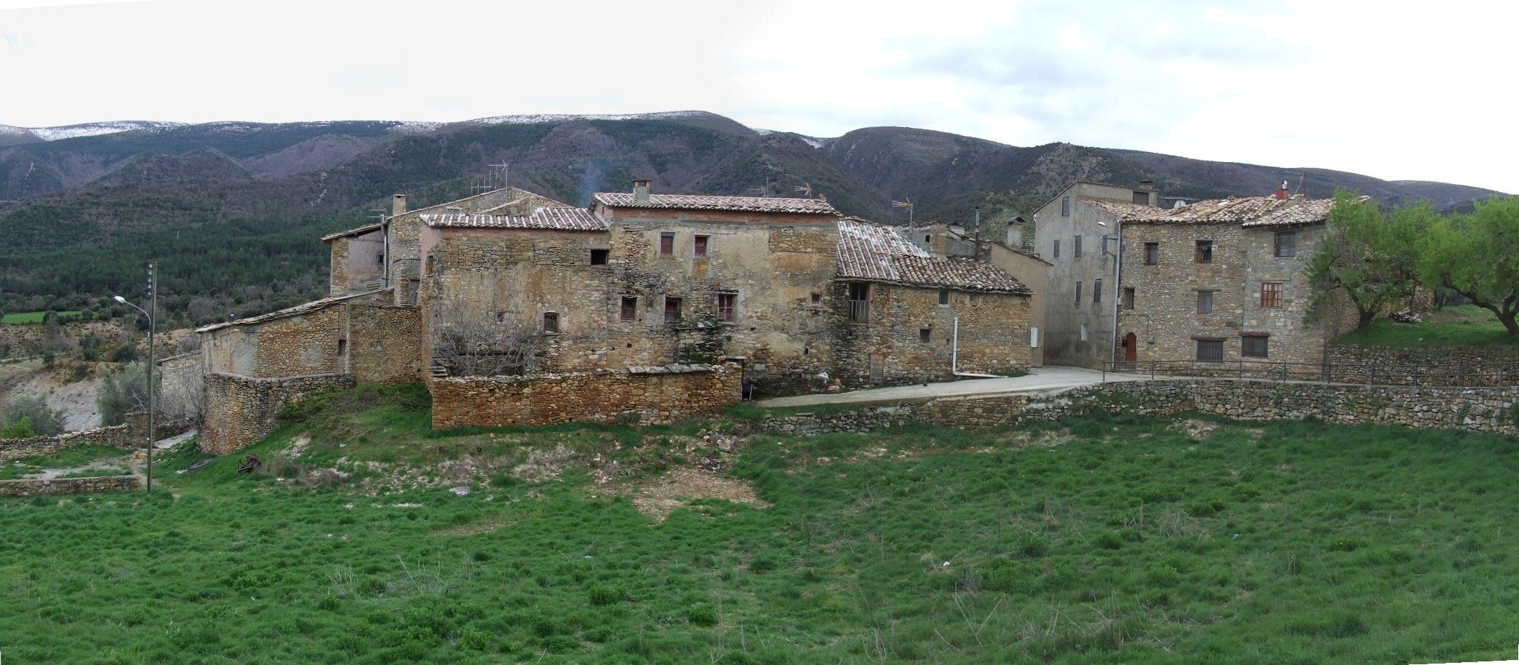 El poble, des del nord (Sant Esteve de la Sarga, Pallars Jussà)